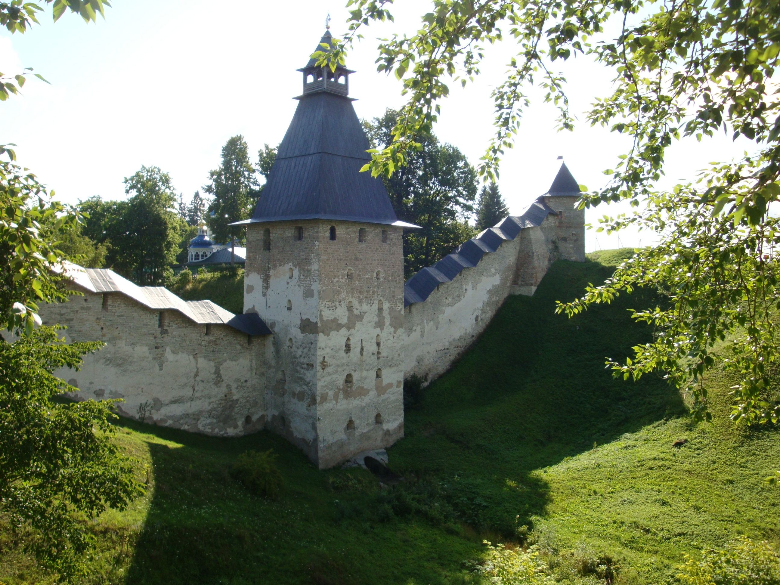 башня Верхних решеток (Псковская область, Печоры, город Печоры)